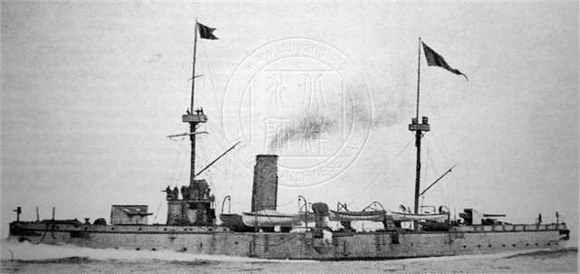 Фото крейсера "Чжиюань"